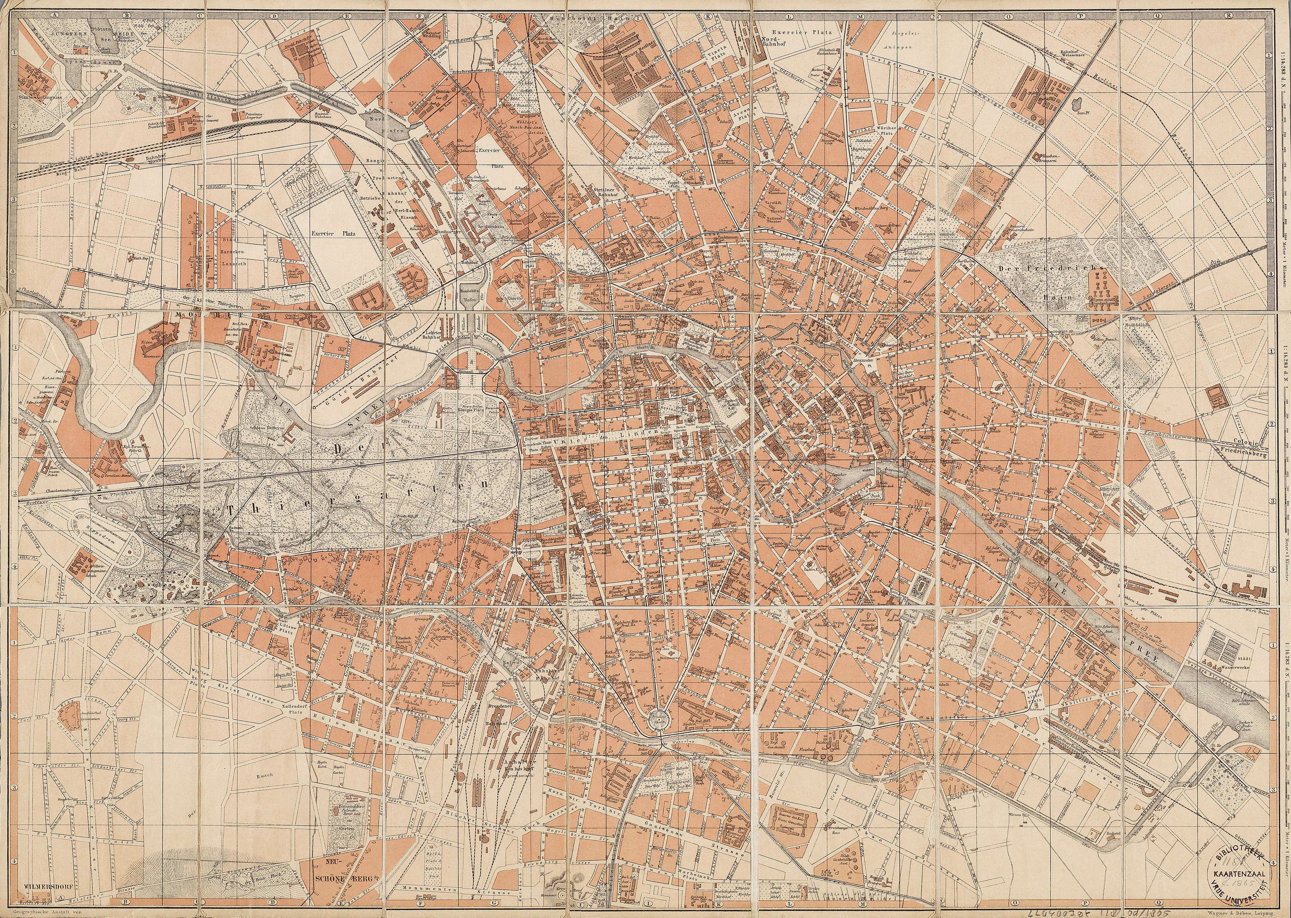 Der Plan besteht aus 3 horizontalen Streifen und sind hintereinander in Baedekers Reiseführer "Mittel- und Nord-Deutschland 1878" gebunden. Auf jedem Teilstück ist am rechten Rand der Maßstab und eine Maßstabsleiste über 1000 m abgedruckt. Unter dem letzten Blatt steht der Hersteller "Geographische Anstalt von Wagner & Debes, Leipzig".